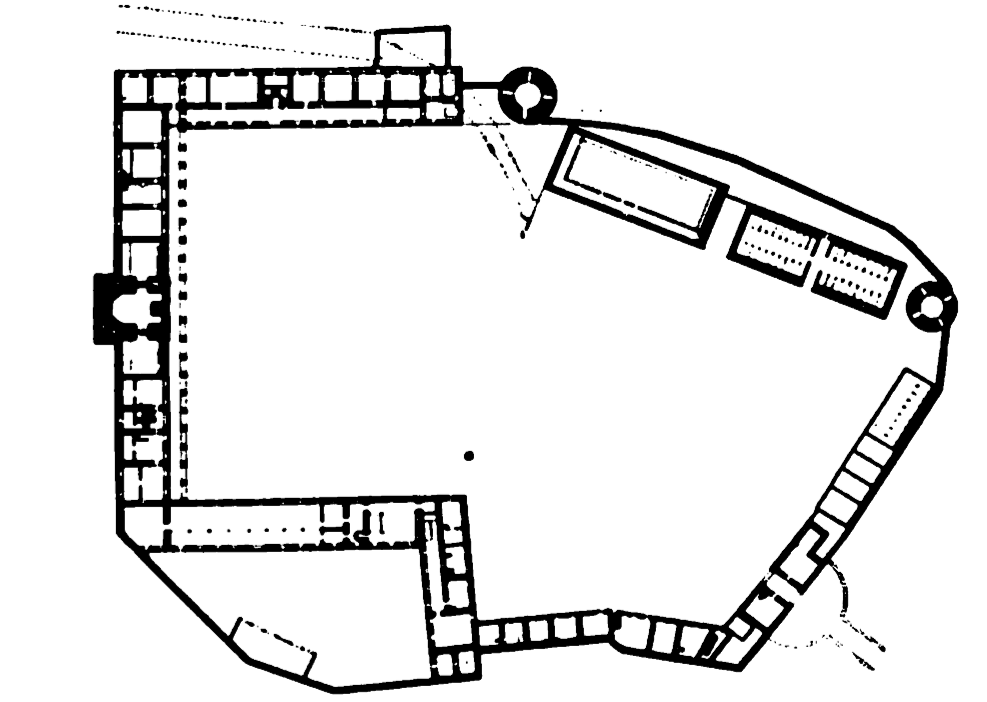 Unteres Schloss in Siegen/Westfalen: Grundriss. Zeichnung von Albert Ludorff, 1903